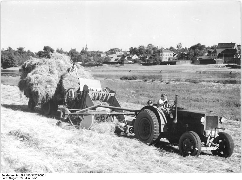 Röderau-Promnitz, Heuernte, Heusammler Zentralbild Siegert 3 Motive 22.6.1955 Heuernte leicht gemacht Die Mechanisierung der Landwirtschaft macht durch die Ausstattung der Maschinen- und Traktoren-Stationen mit neuentwickelten Geräten immer weitere Fortschritte. Auf grösseren Grünlandflächen wird das Heu mit der Räum- und Sammelpresse gleich auf den angehängten Wagen verladen. UBz: Die MTS Münchritz bei Riesa-Elbe arbeitet mit der Räum- und Sammelpresse auf den am Elbufer gelegenen Flächen der LPG Röderau-Promnitz. Die Dörfer Röderau und Promnitz gehören zur Gemeinde Zeithain, Landkreis Meißen